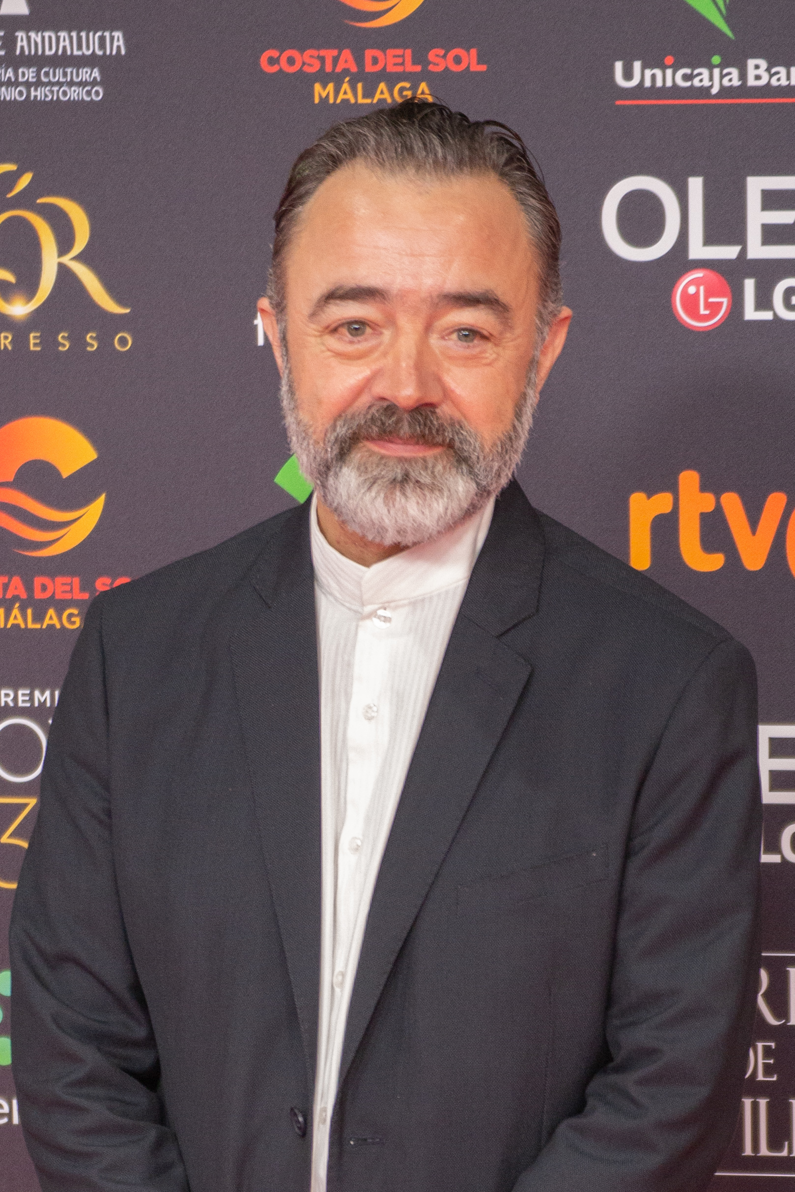 Santi Prego en la alfombra roja de los premios Goya celebrados en Málaga en enero de 2020